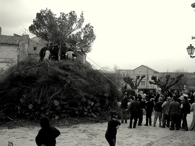 Día de la Copa, Se corona la Hoguera de Castelnou en honor a San Valero con un pino al que se le llama la Copa.